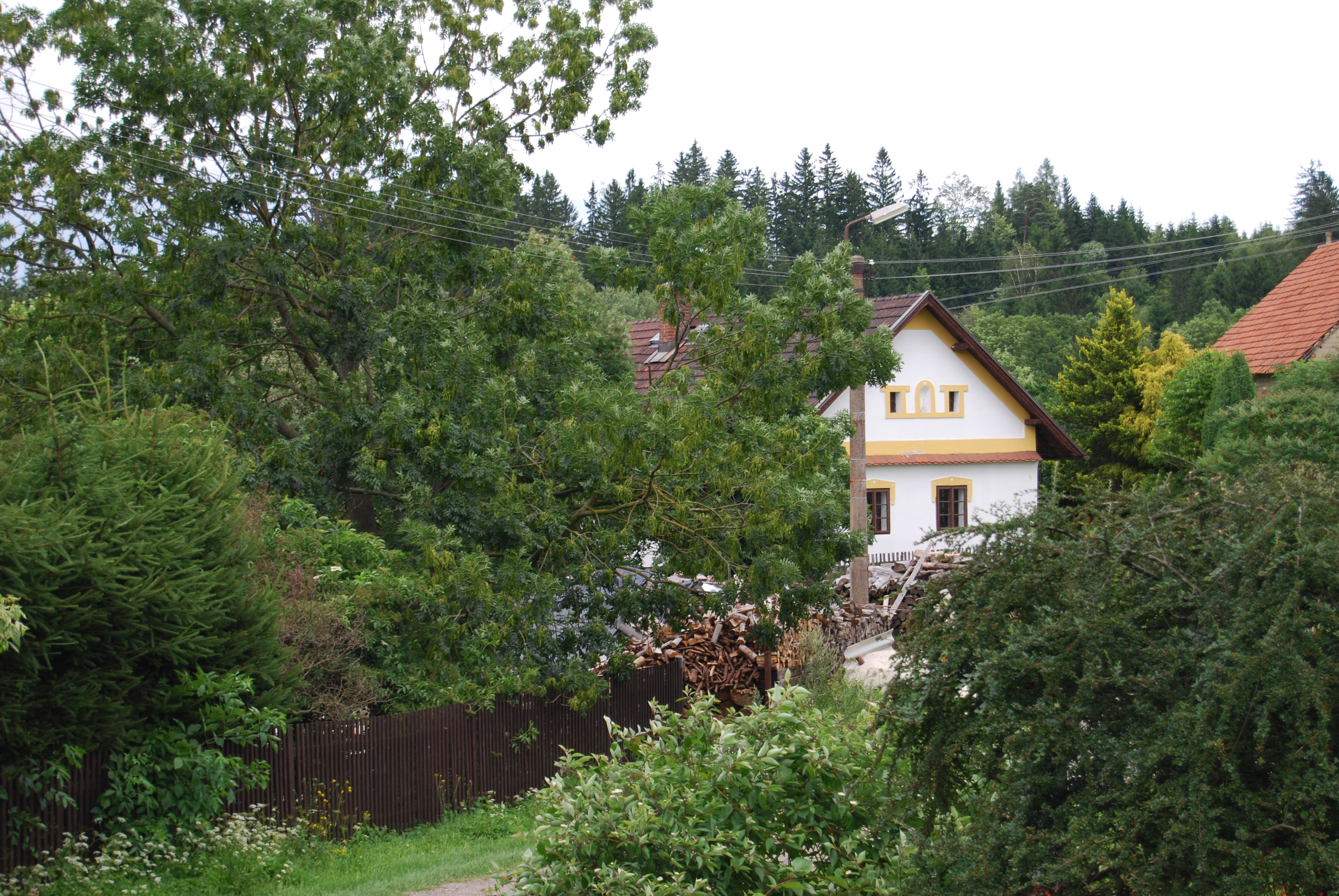 Pohled na část stavení. Chlístov je část obce Nadějkov v okrese Tábor. Česká republika.